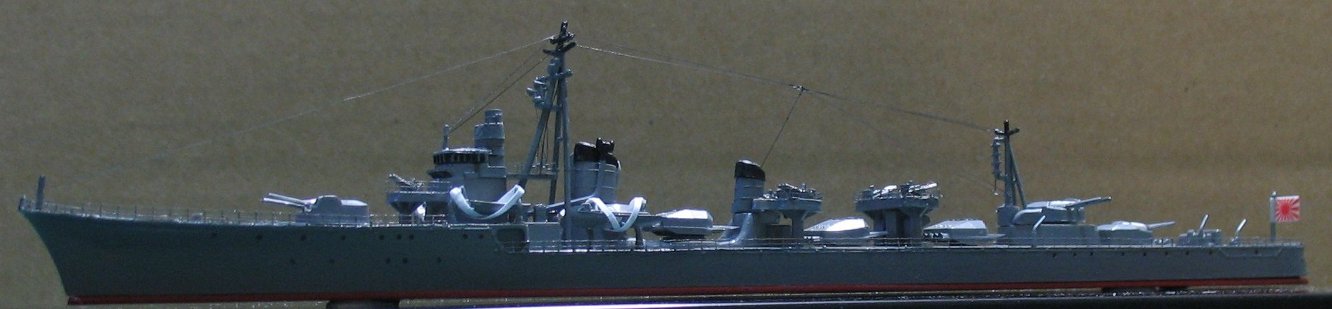 大日本帝国海軍の駆逐艦島風の模型